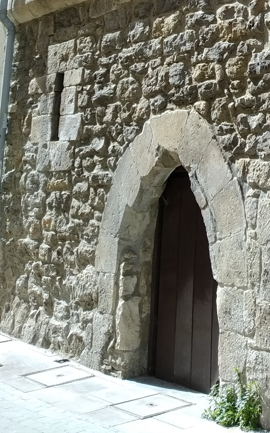 Agurain